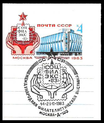 Оригинальная почтовая марка со спецгашением из почтовой карточки, посвящённая Международной филателистической выставке "Соцфилэкс-83"